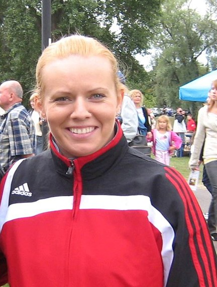 Dominika Misterska - polska sztangistka